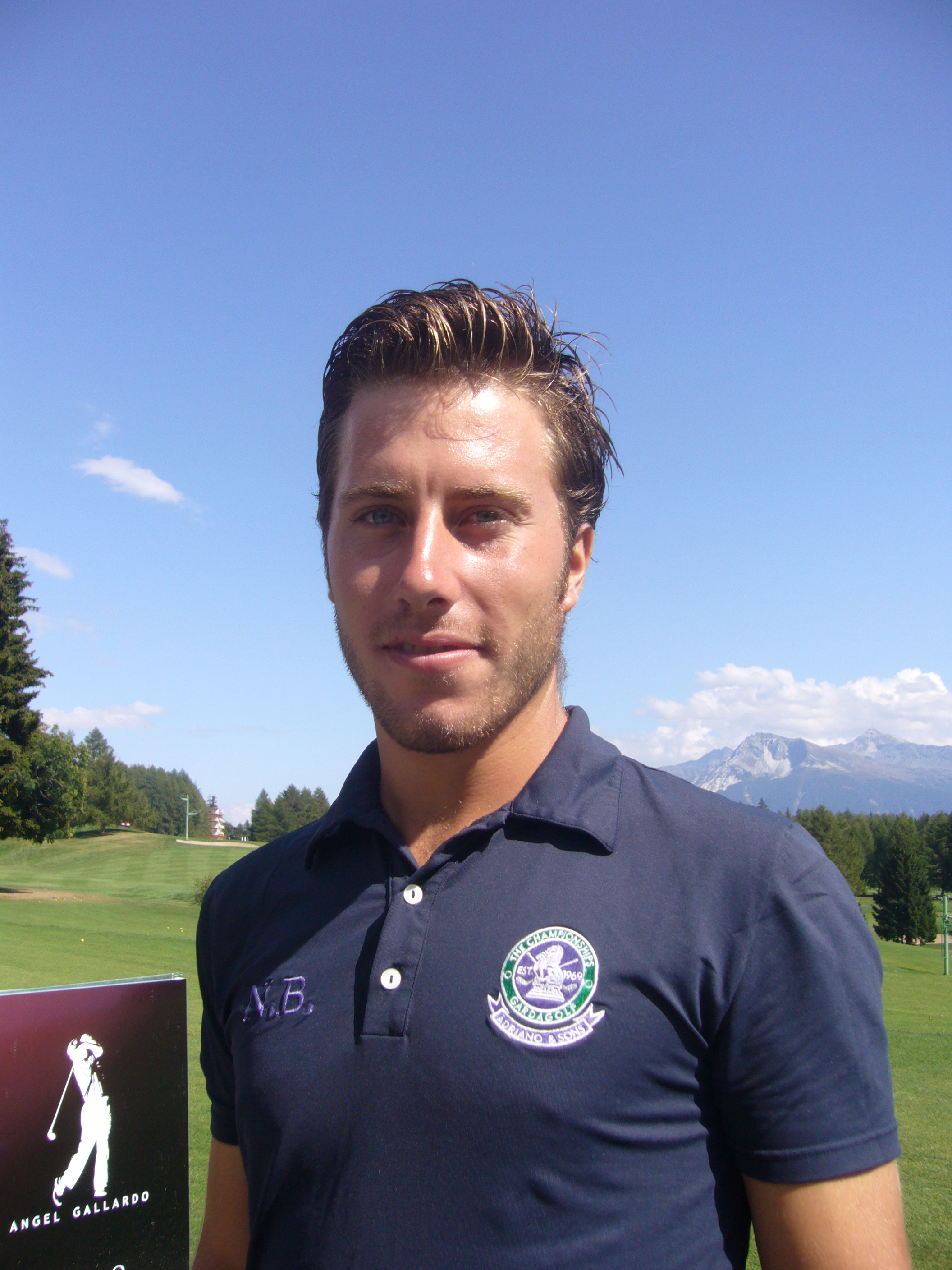 Nino Bertasio speelt als amateur op het Zwitsers Open in Crans